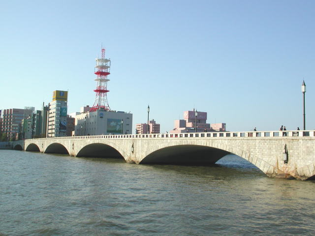 萬代橋（右岸上流側より・その2、2004.10.17）